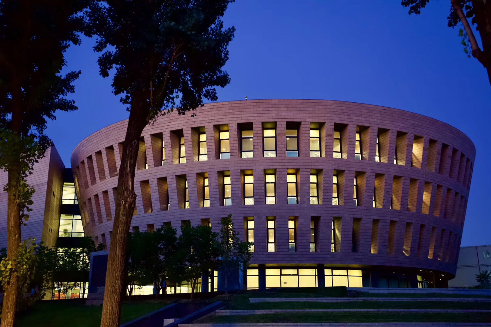 清華大學人文圖書館